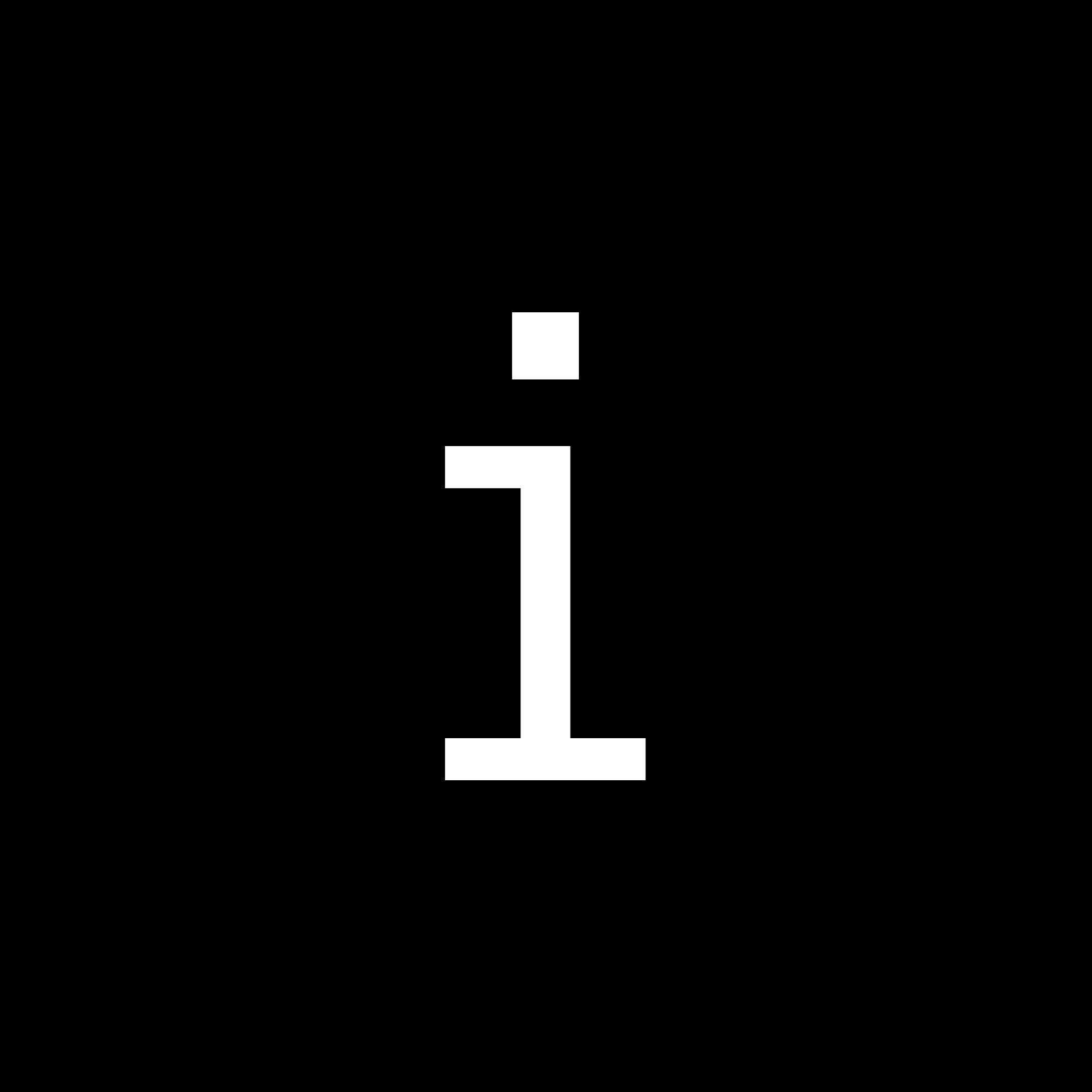 Я хочу, чтобы этот знак символизировал датаизм. С одной стороны это буква "i" (information), с другой стороны это цифра "1" (бинарный код).